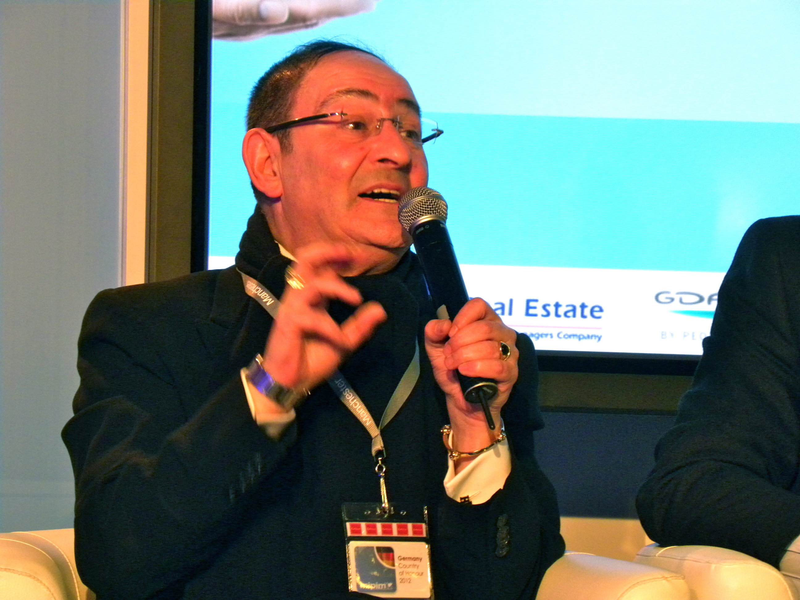 MIPIM 2012 - UK cities debate, Sir Howard Bernstein